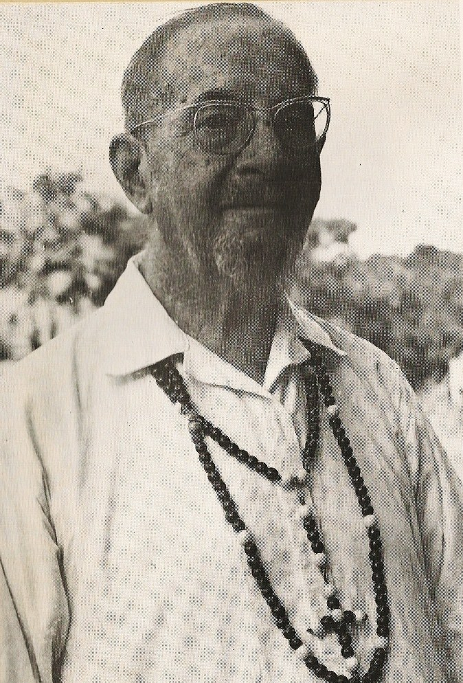 Portrait de Jean-Louis Goarnisson